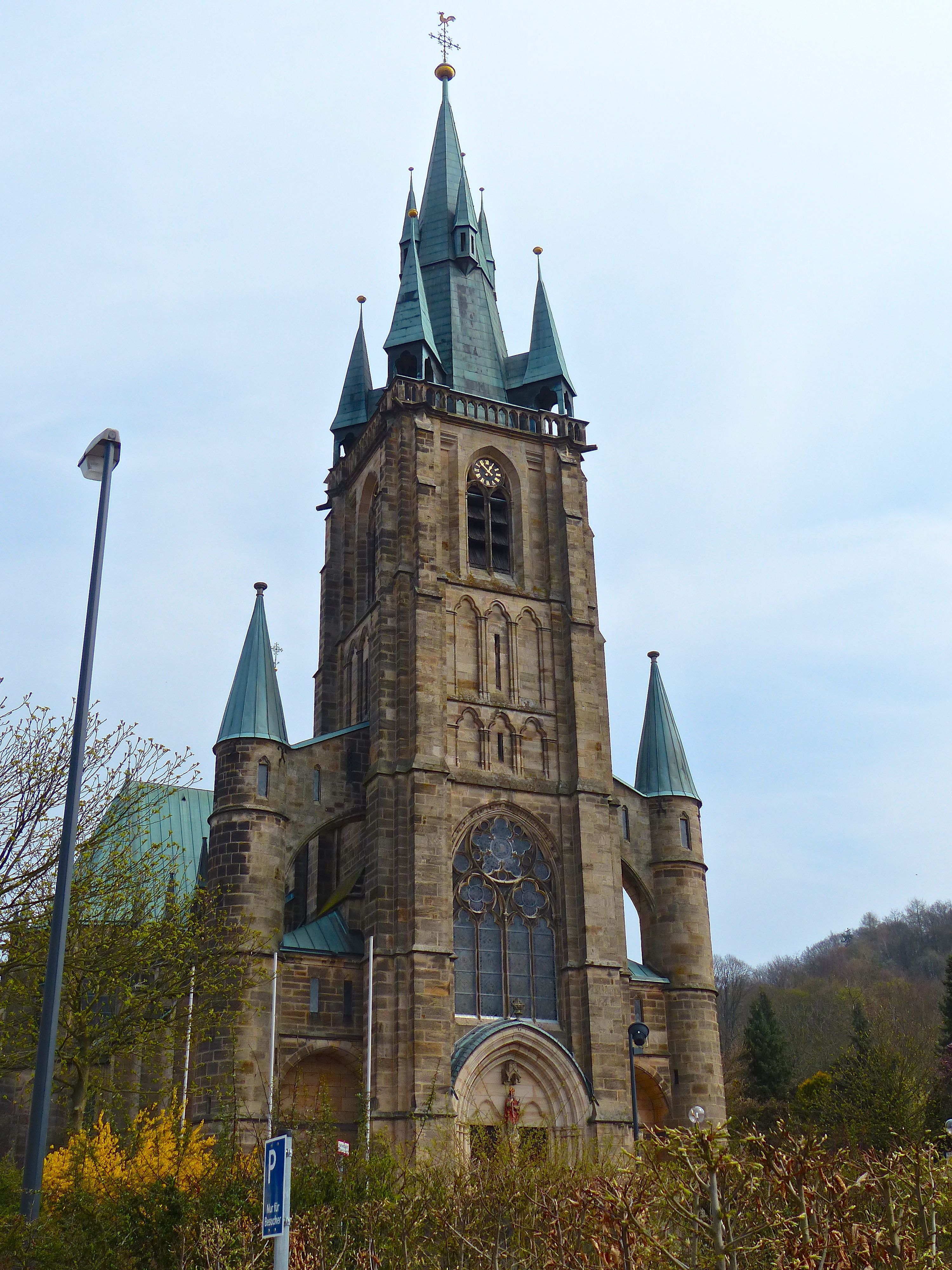 St. Bonifatius im Fuldaer Stadtteil Horas